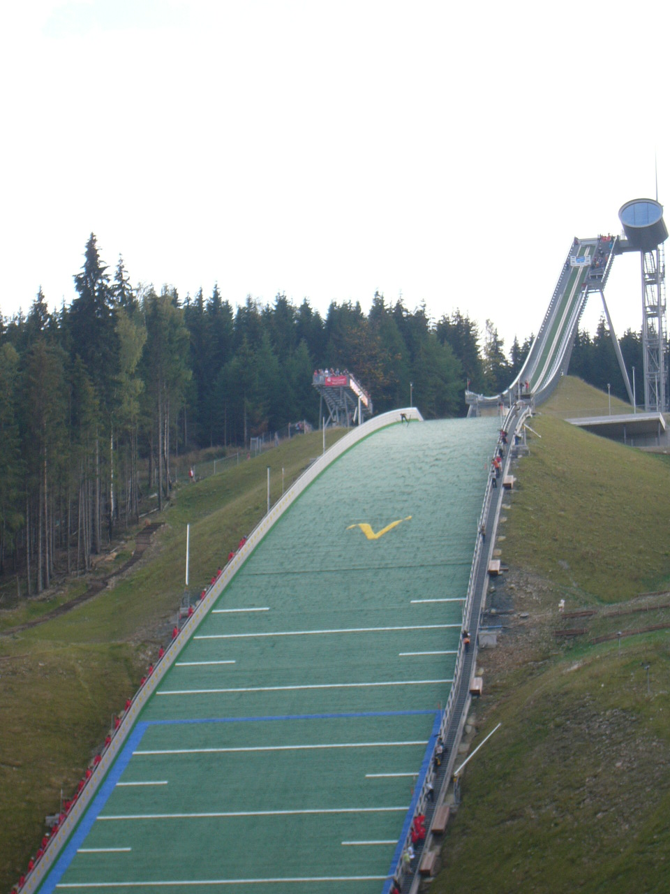 Sommer-Grand Prix in der Vogtlandarena am Schwarzberg in Klingenthal/Sa. 2007